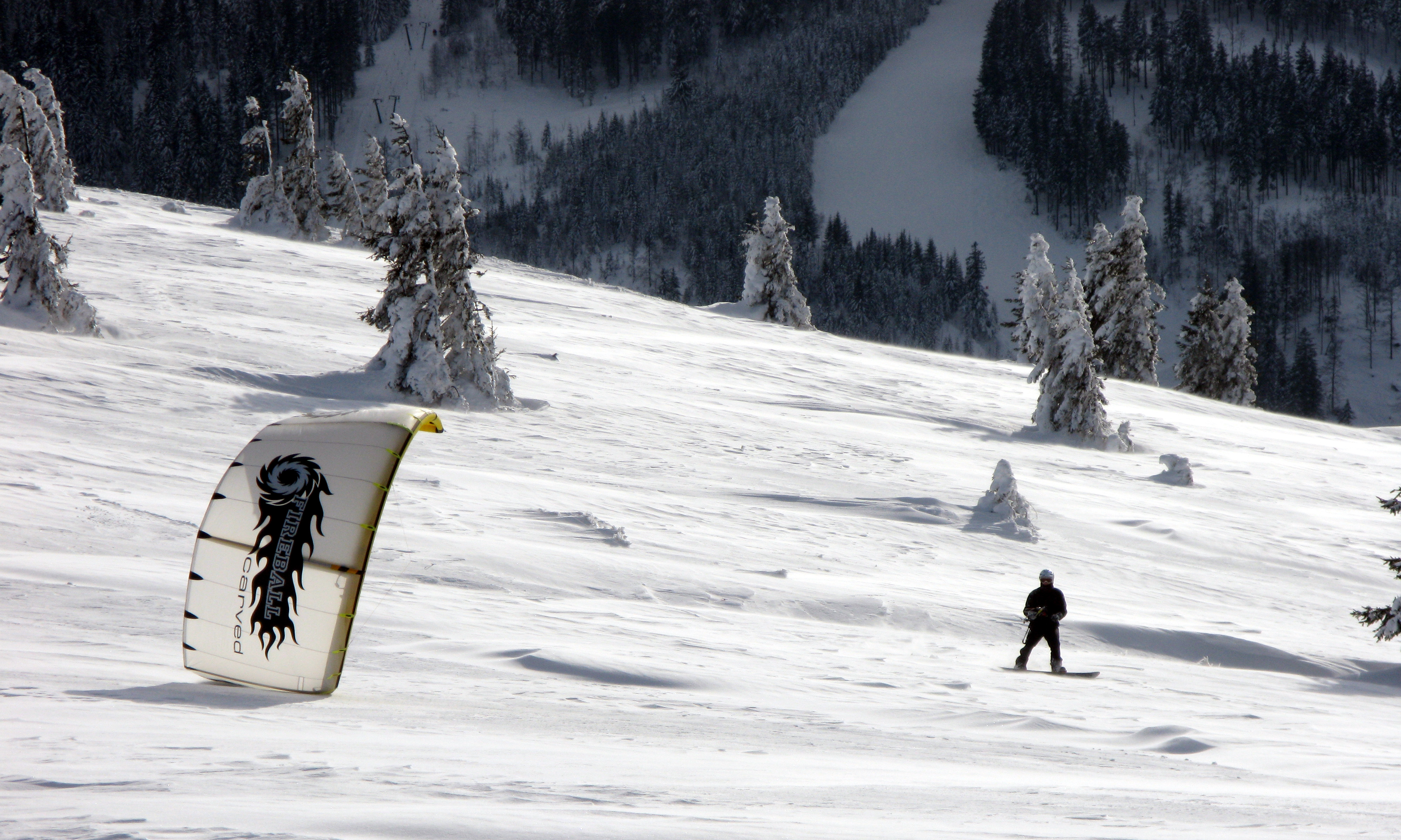 Snowkiting am Feldberg